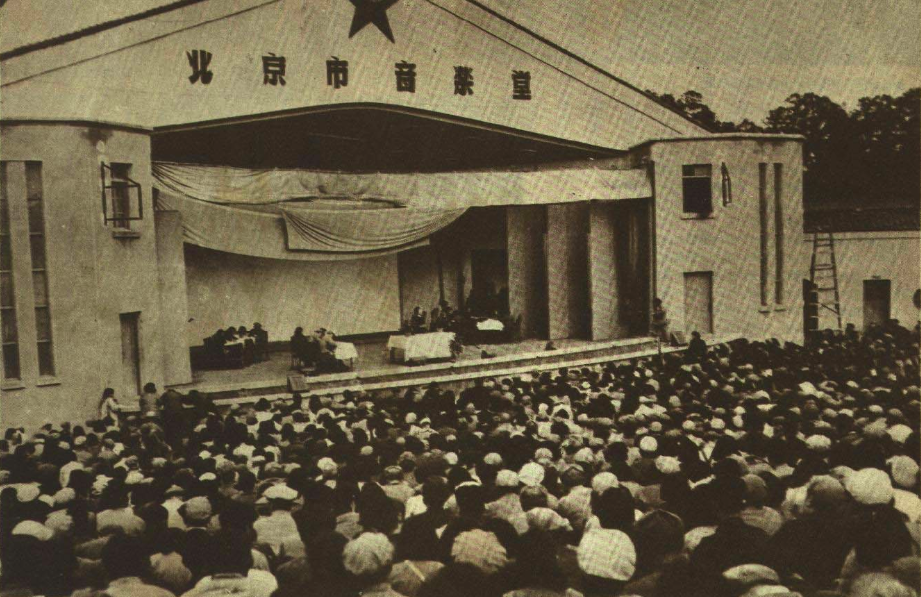 1951年国际妇女节